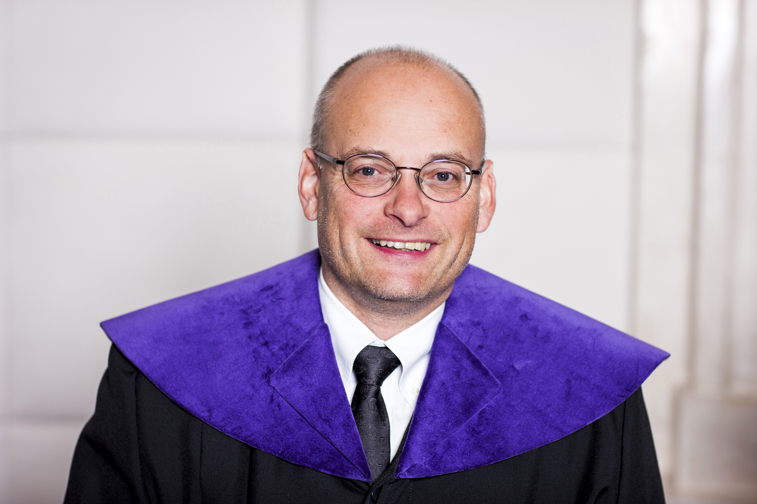 Dr. Michael Holoubek, Mitglied des österreichischen Verfassungsgerichtshofs seit 2011.